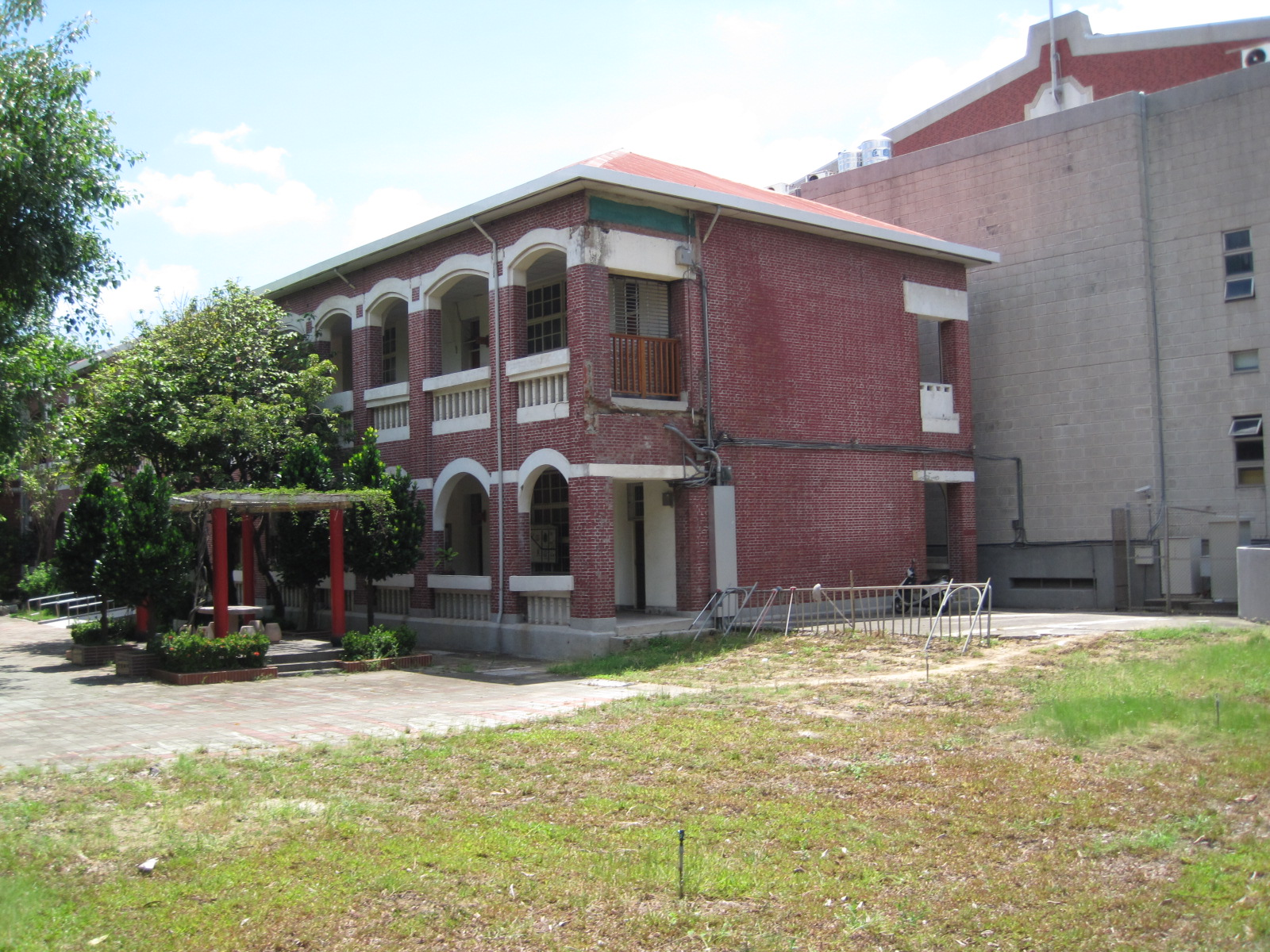 臺南原花園尋常小學校本館